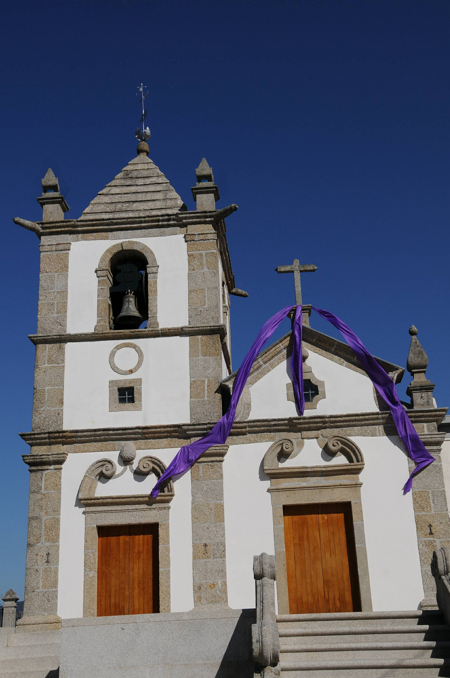 Figueiredo Church, in Braga, Portugal